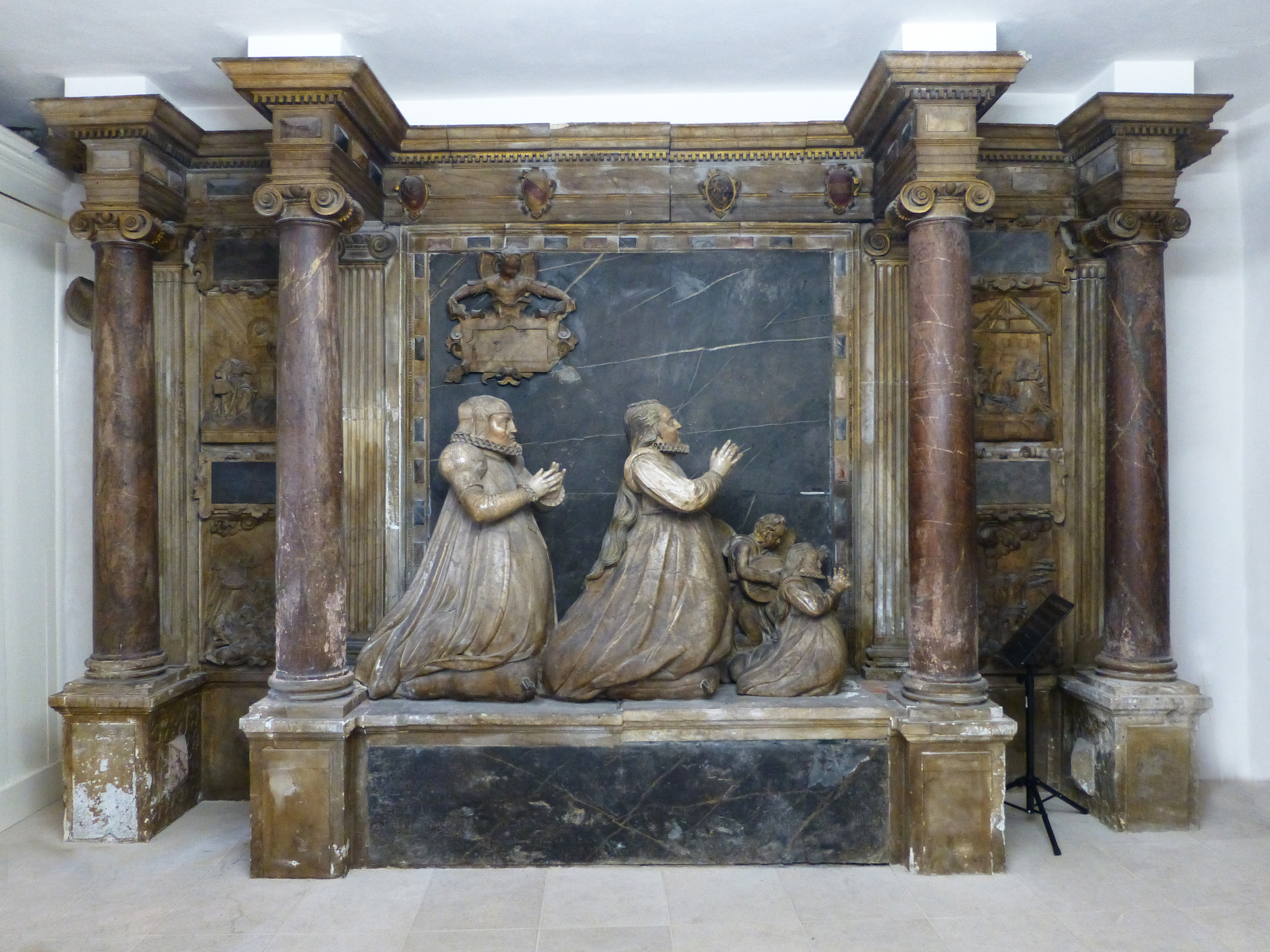 Weimar, Stadtkirche St. Peter und Paul (Herderkirche) : Epitaph der Herzogin Dorothea Susanna, geb. Pfalzgräfin bei Rhein (1544-1592)